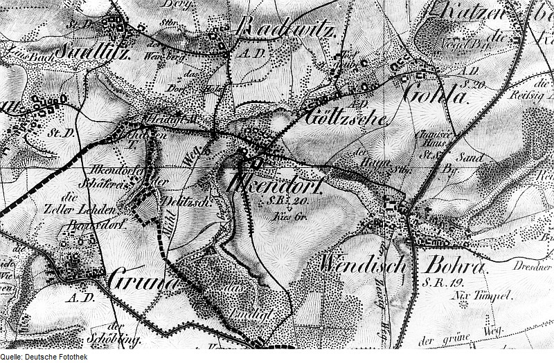 Original image description from the Deutsche Fotothek Nossen-Ilkendorf. Oberreit, Sect. Freiberg, vor 1843